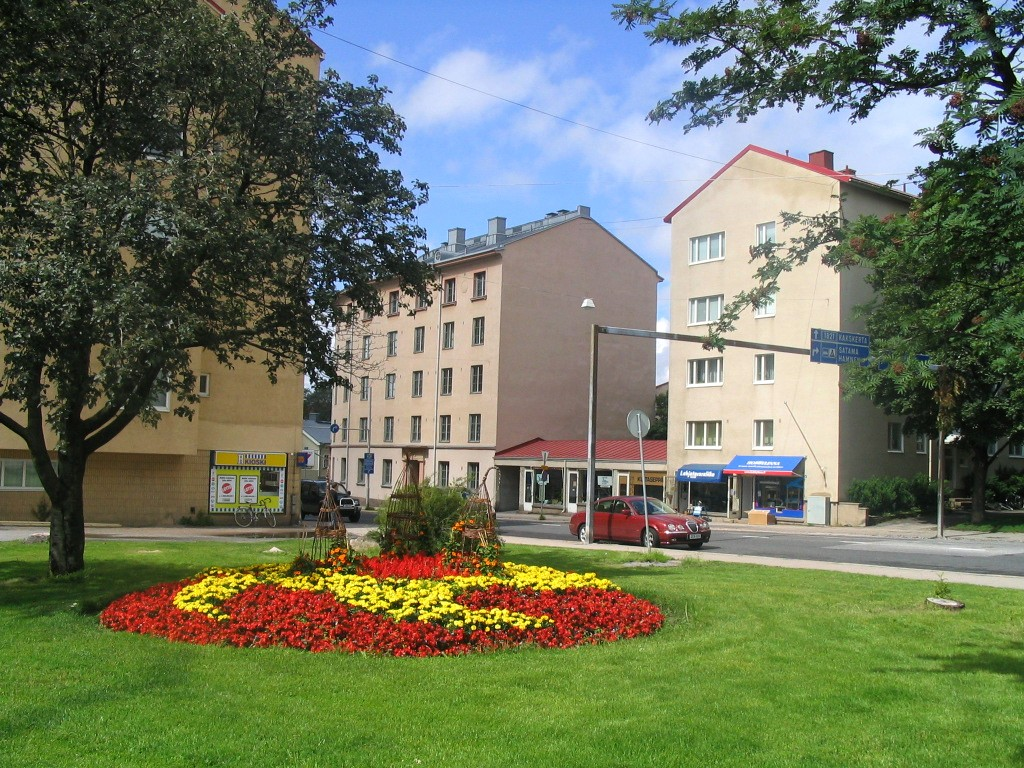 Martin kaupunginosaa Turussa.